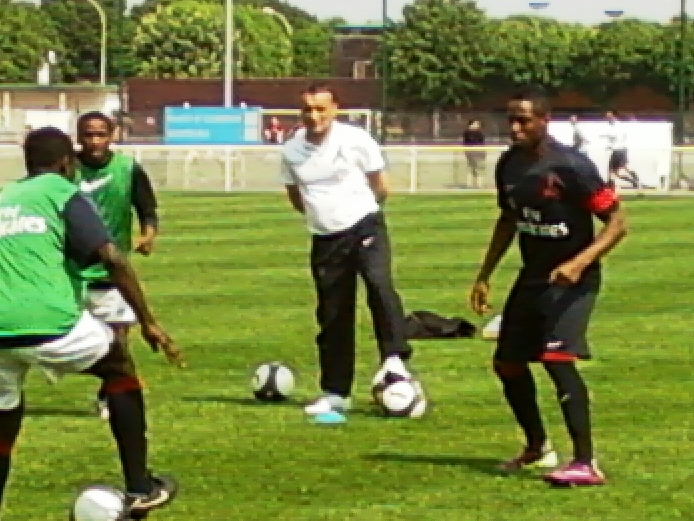 Bertrand Reuzeau échauffe ses joueurs avant le match PSG B - Sochaux B du 24 avril 2011